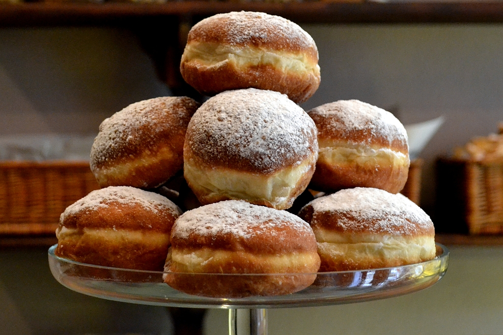 Pfannkuchen am fettigen Donnerstag, Sanok